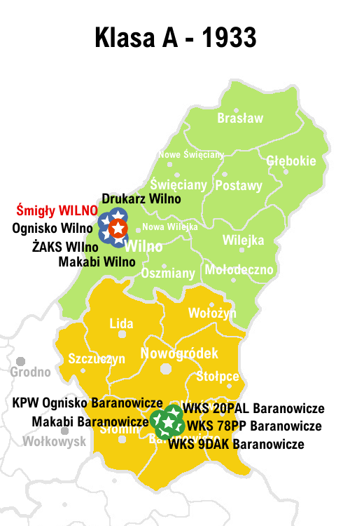 Uczestnicy Rozgrywek Wil.OZPN klasa A - rok 1933